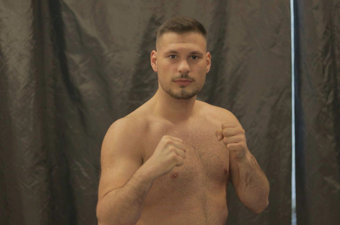 Aufnahme des Profiboxers Sahan Aybay